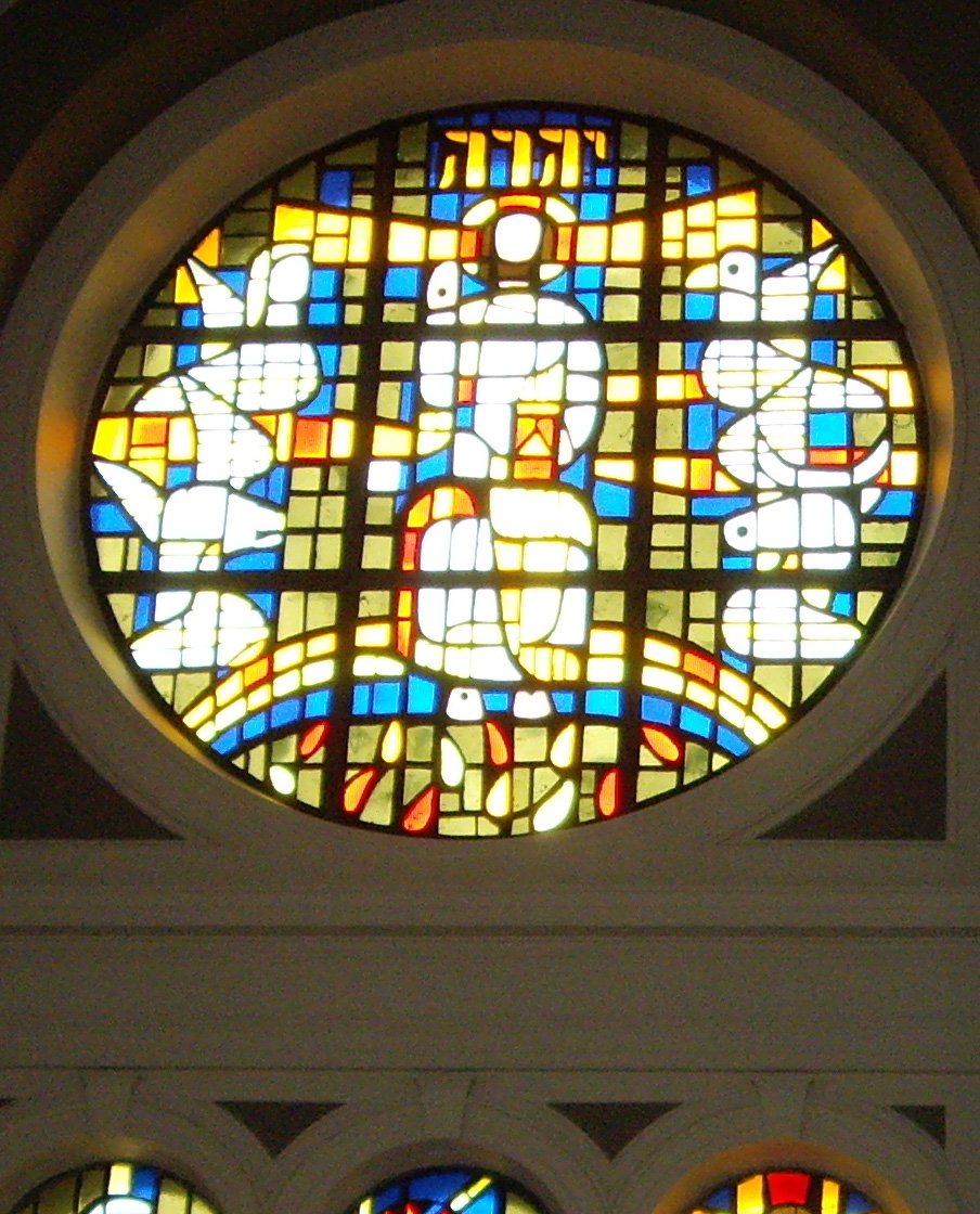 S:t Clemens kyrka i Laholm - Korfönster med gudsnamnet JHWH på hebreiska högst upp